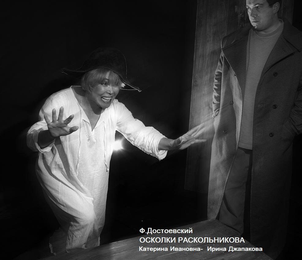 Спектакль Камерного драмтического театра по роману Ф.М.Достоевского "Преступление и наказание". Режиссер Яков Рубин. 2006